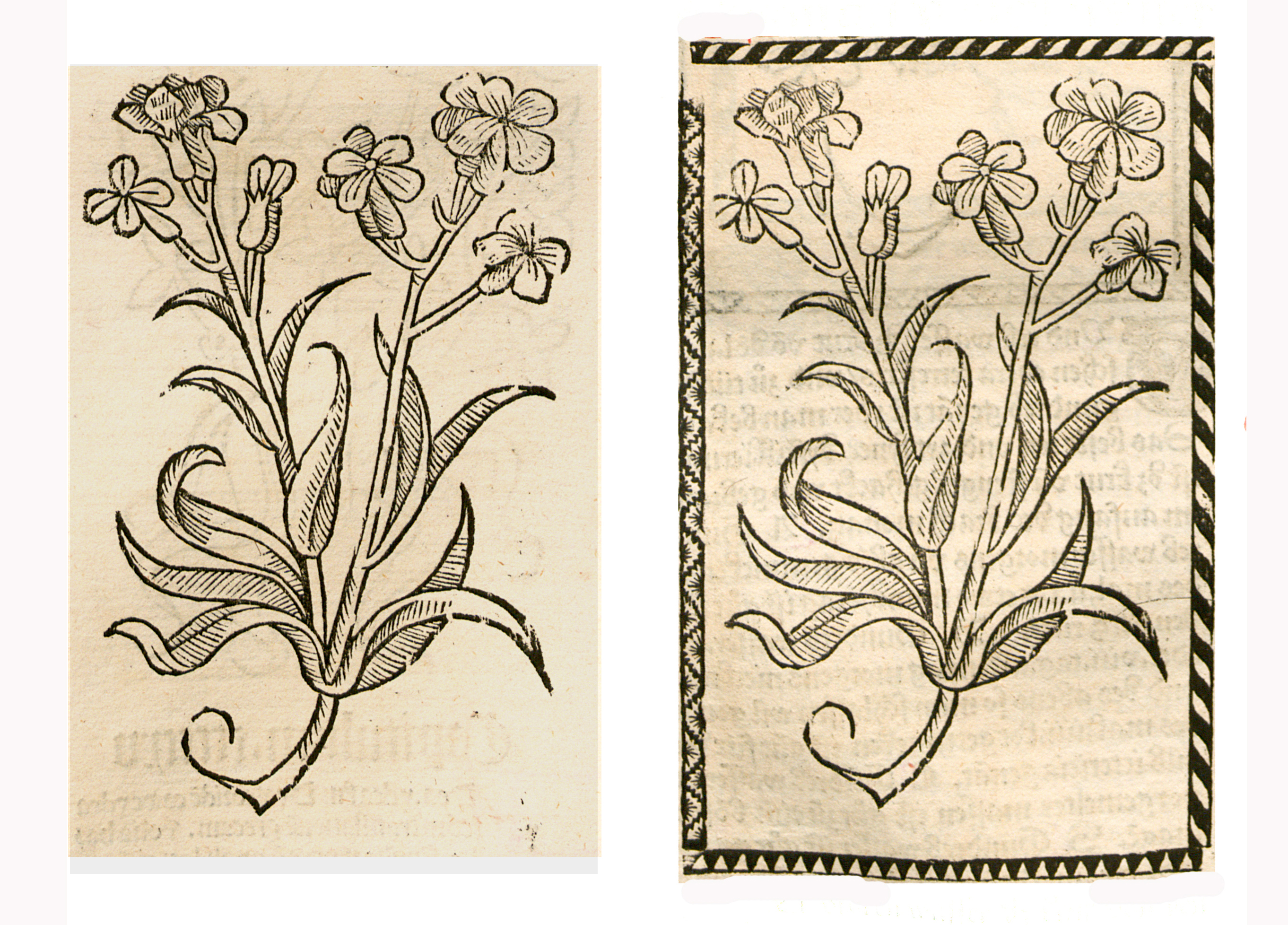 Abbildung zum Kapitel Gel Gilgen (Iris pseudacorus)